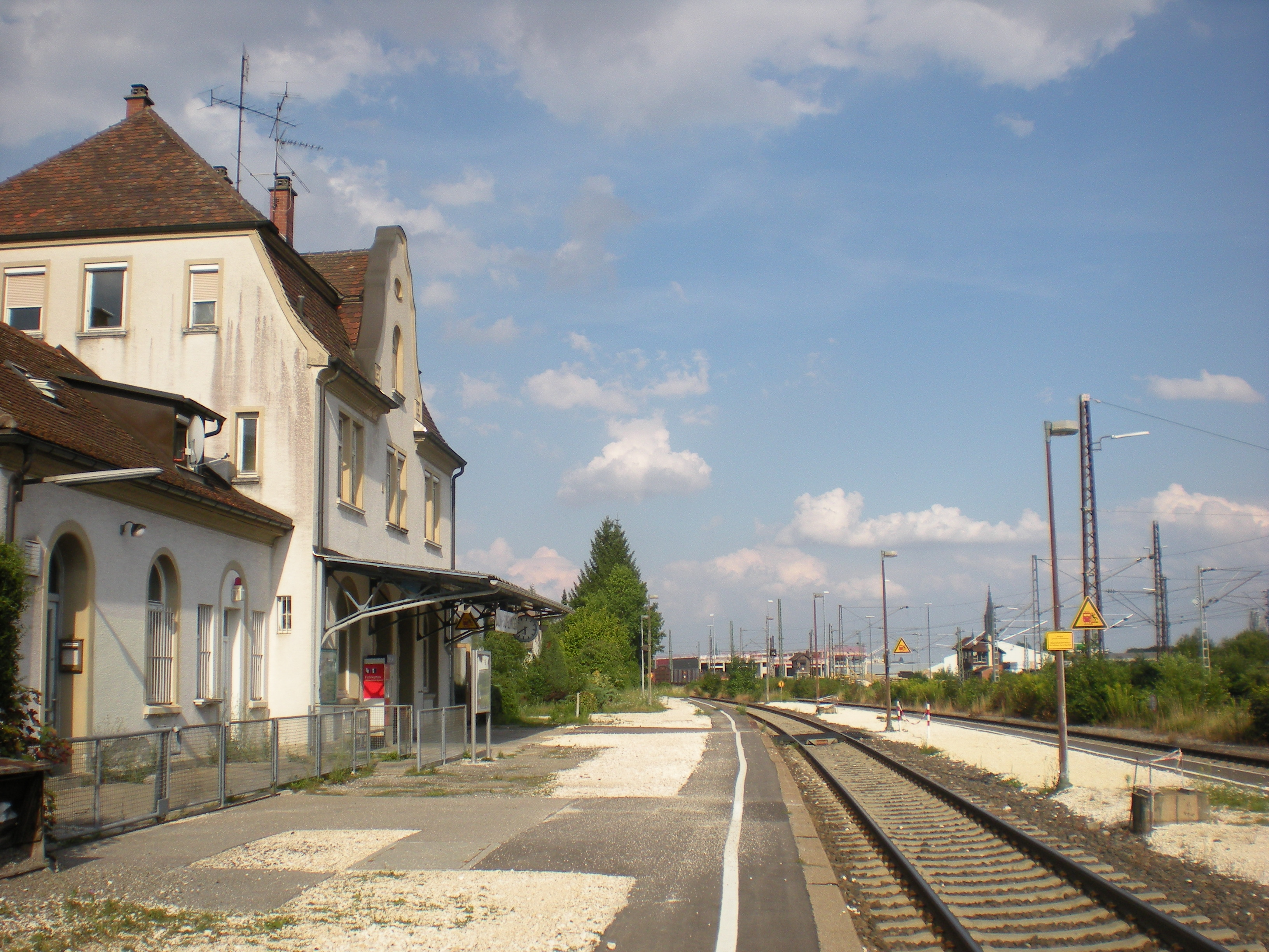 Bahnsteige und Gleisseite des Empfangsgebäudes des Bahnhofs Ulm-Söflingen